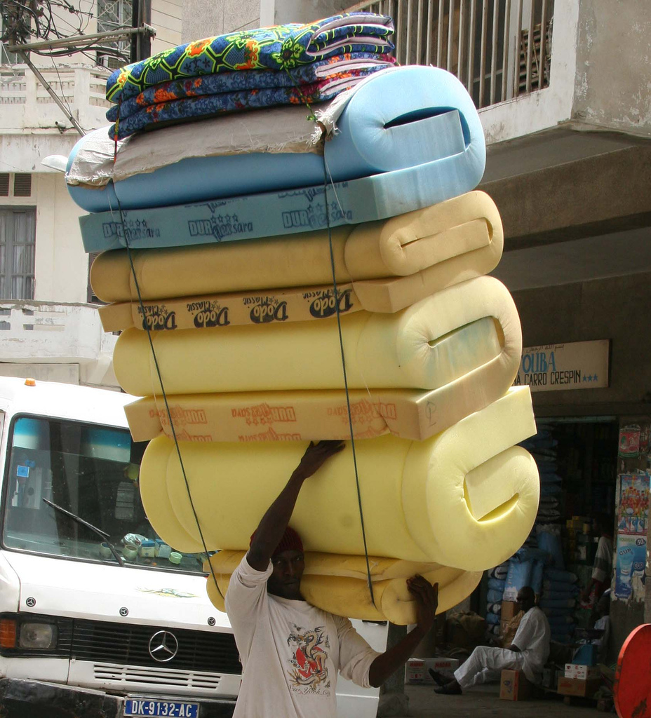 Transport de matelas dans une rue de Dakar, Sénégal